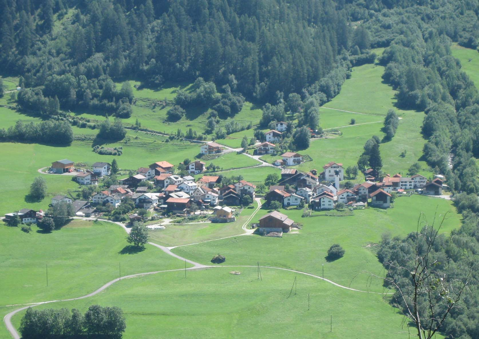 Pignia